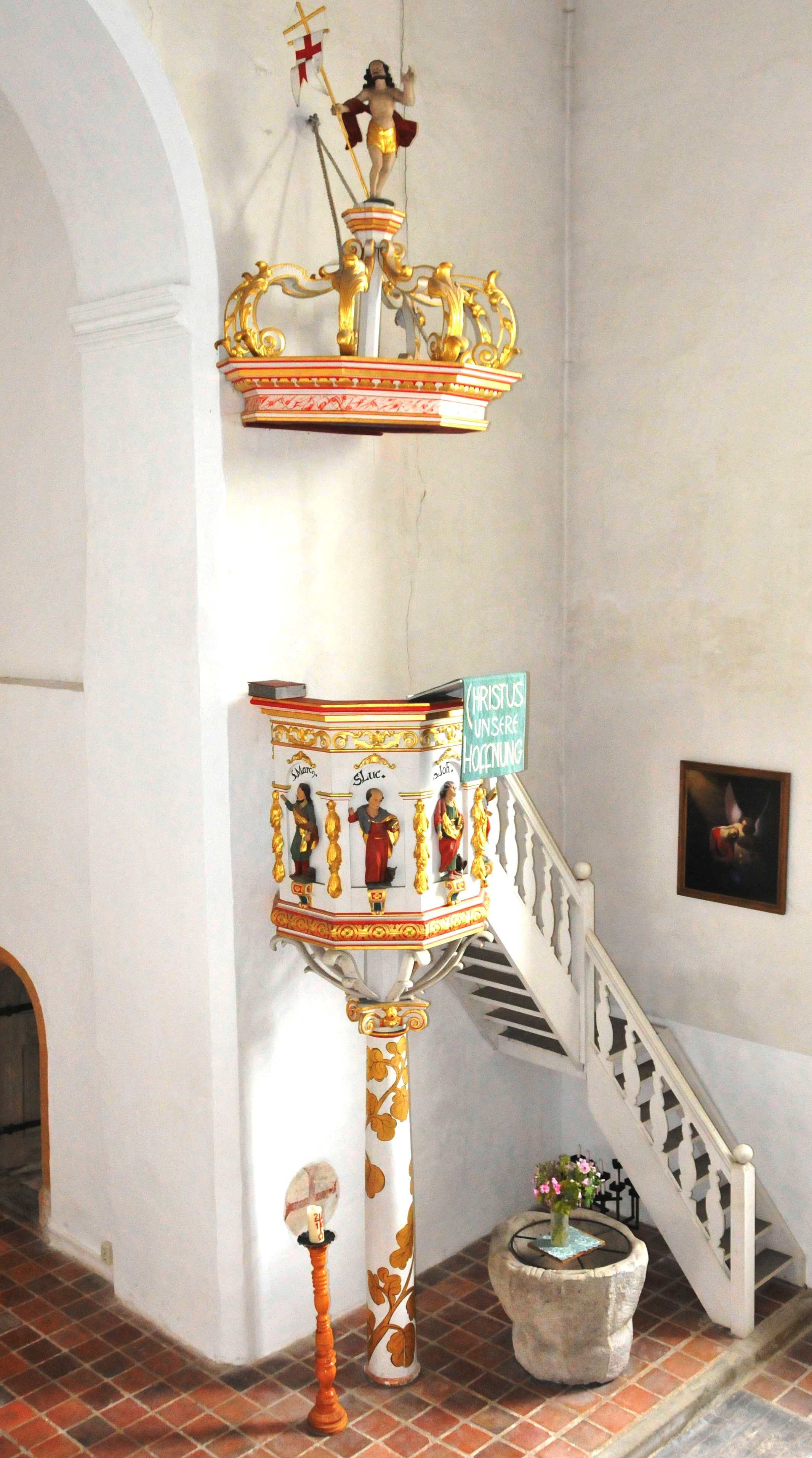 Queienfeld, Kirche, Kanzel